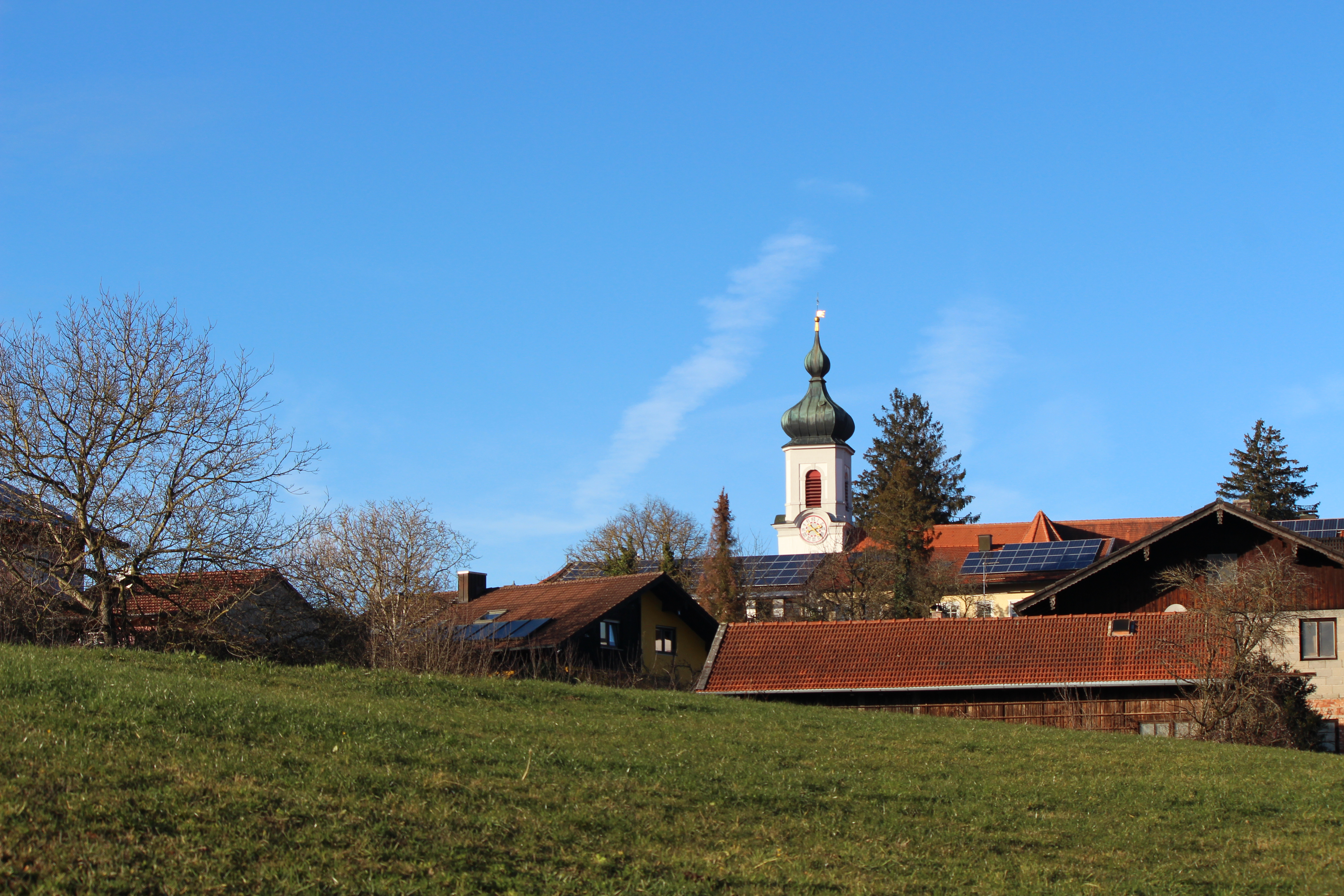 Maitenbeth